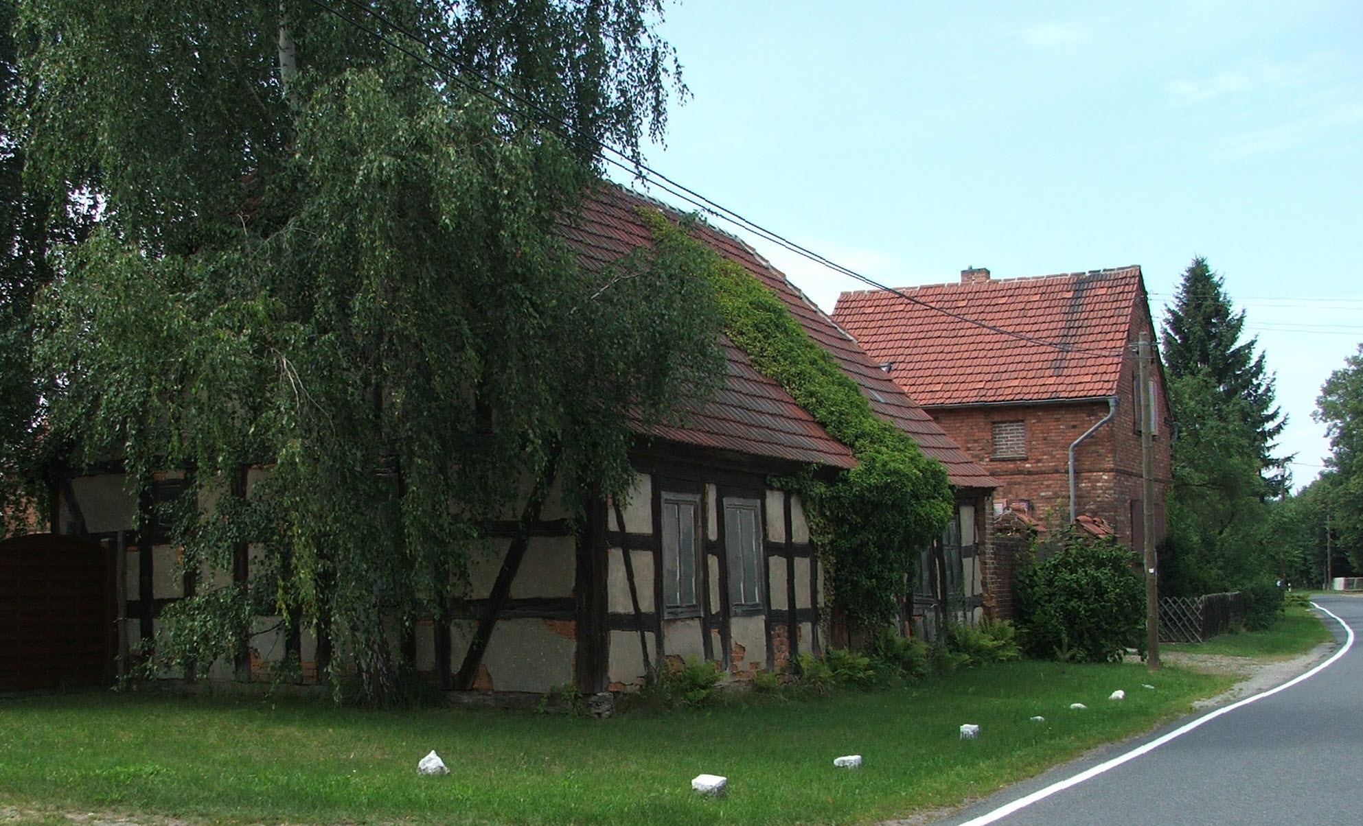 Haus in Krassig Ortsteil von Schlieben